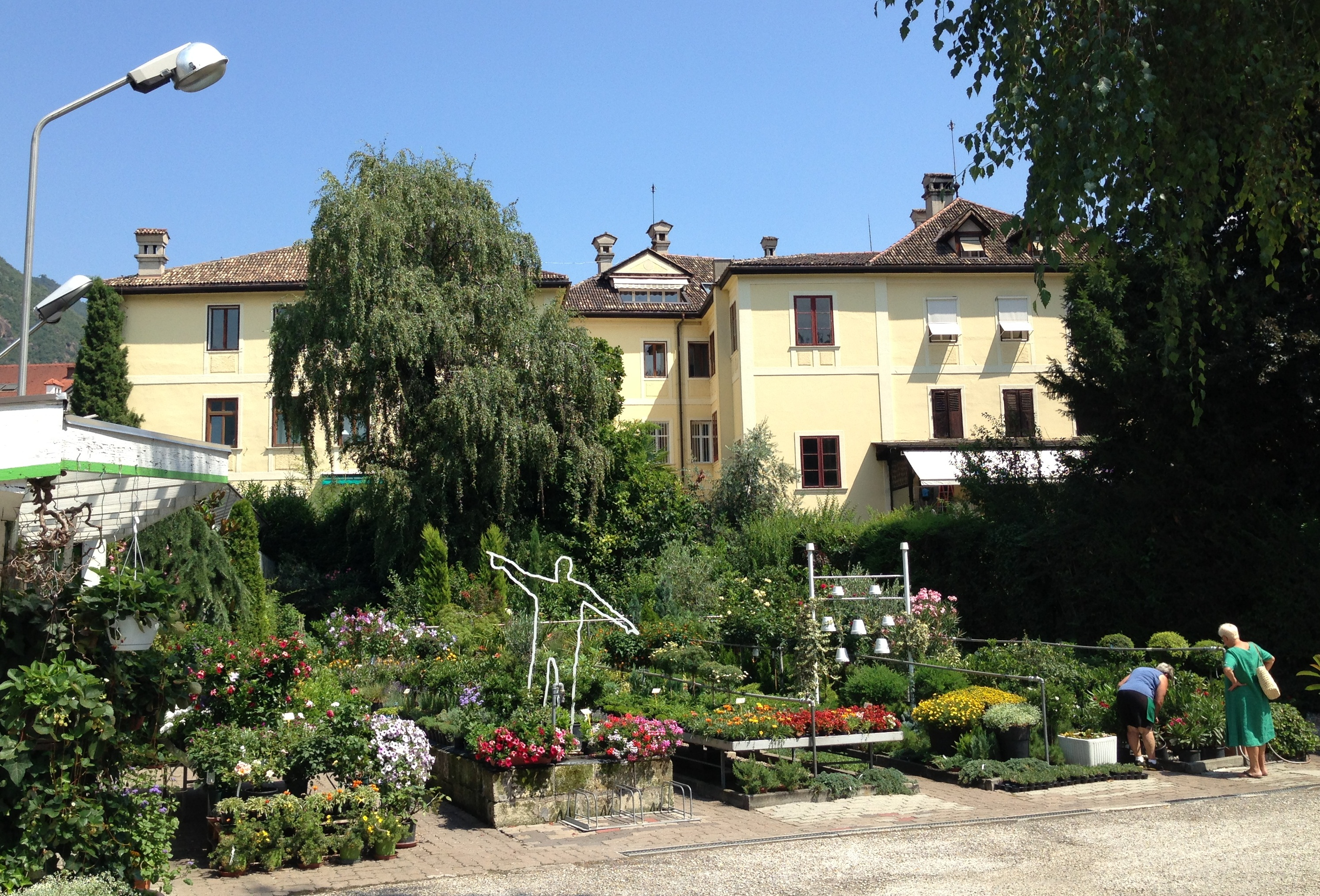 Ansitz Stillendorf in Bozen (Westansicht)